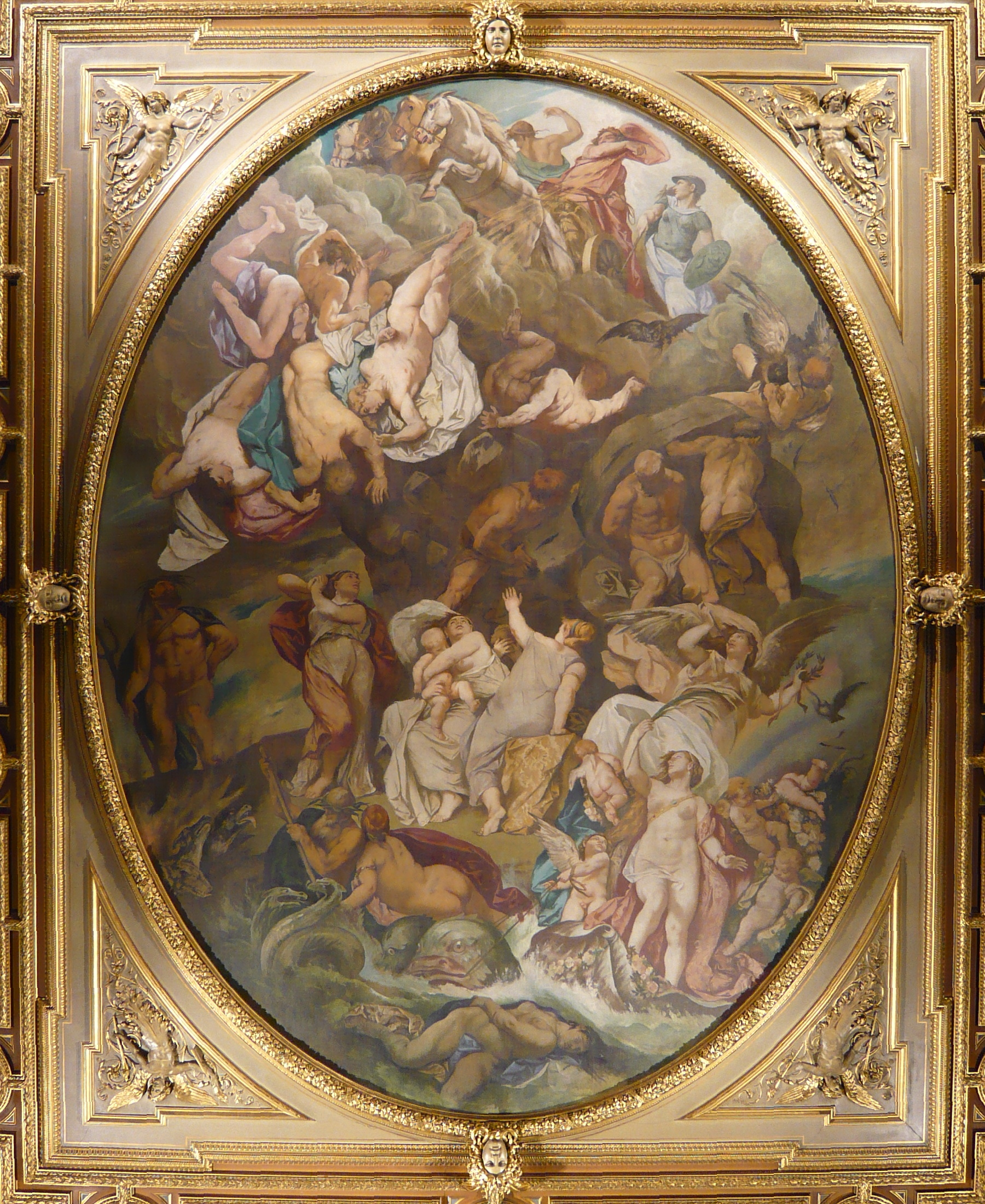 Deckenbild